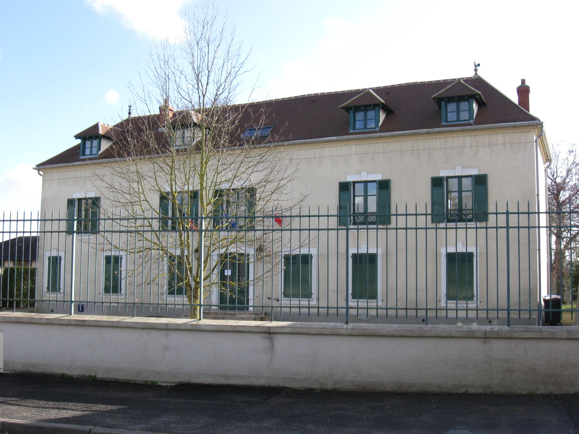 Mairie de Poincy. (Seine et Marne, région Île-de-France).